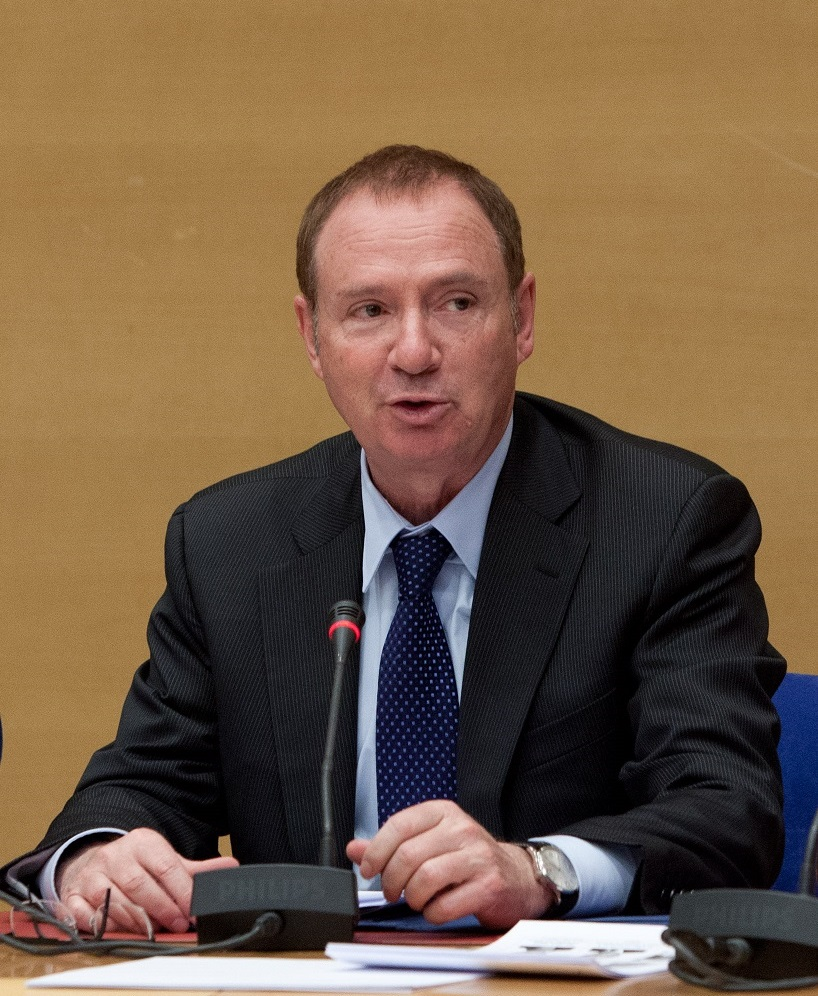 Au sénat (2013)